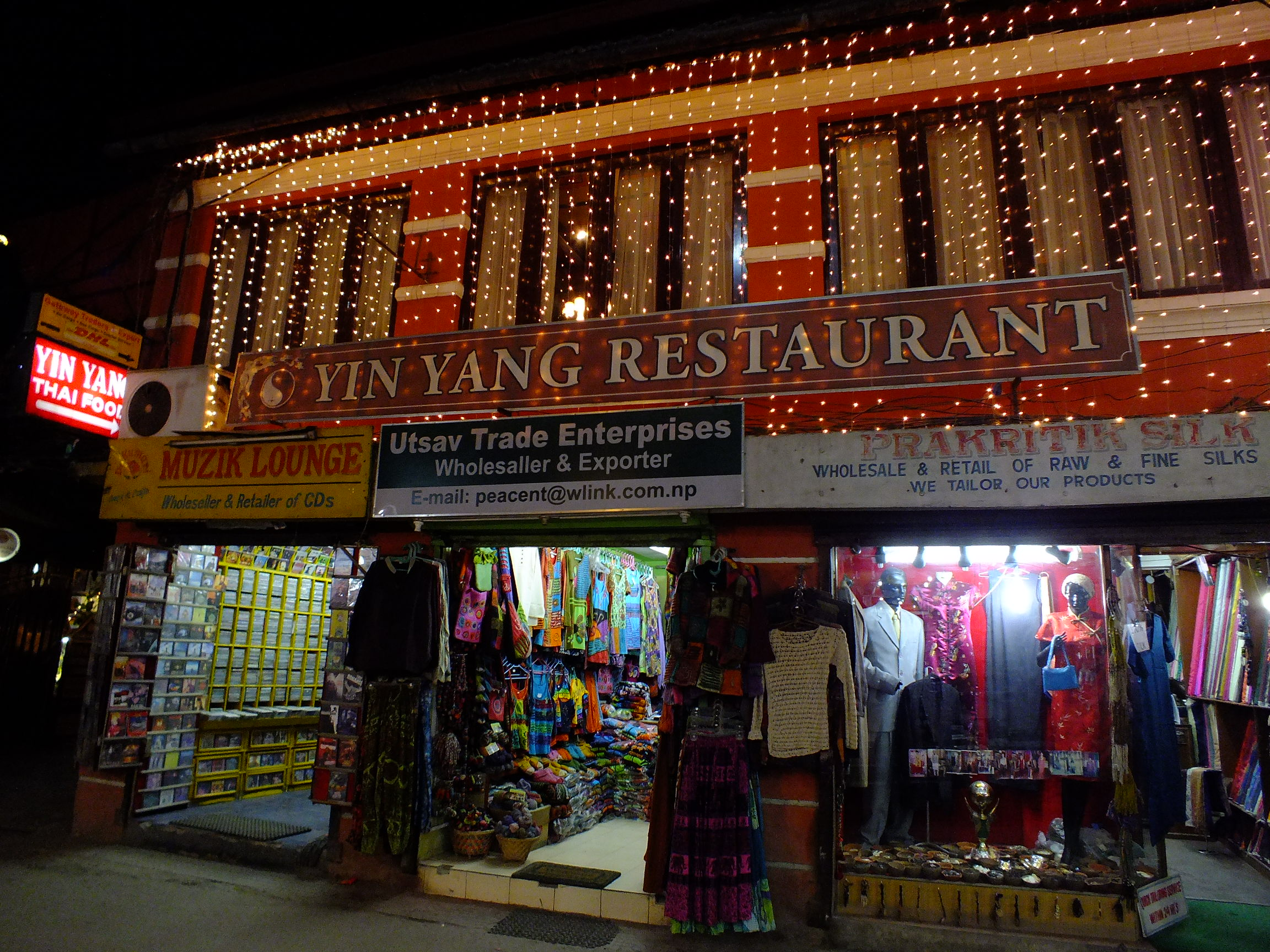 2015-03-09 Yin Yang Restaurant in Thamel, Kathmandu, Nepal 外観